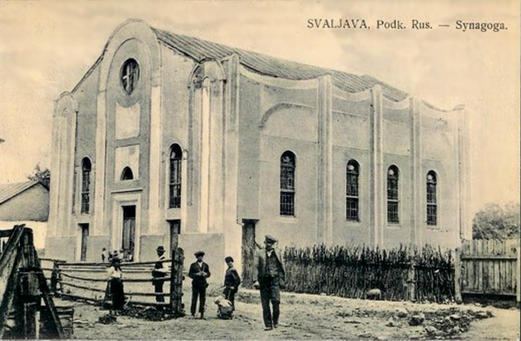 Синагога в Сваляве, открытка 1922 г.